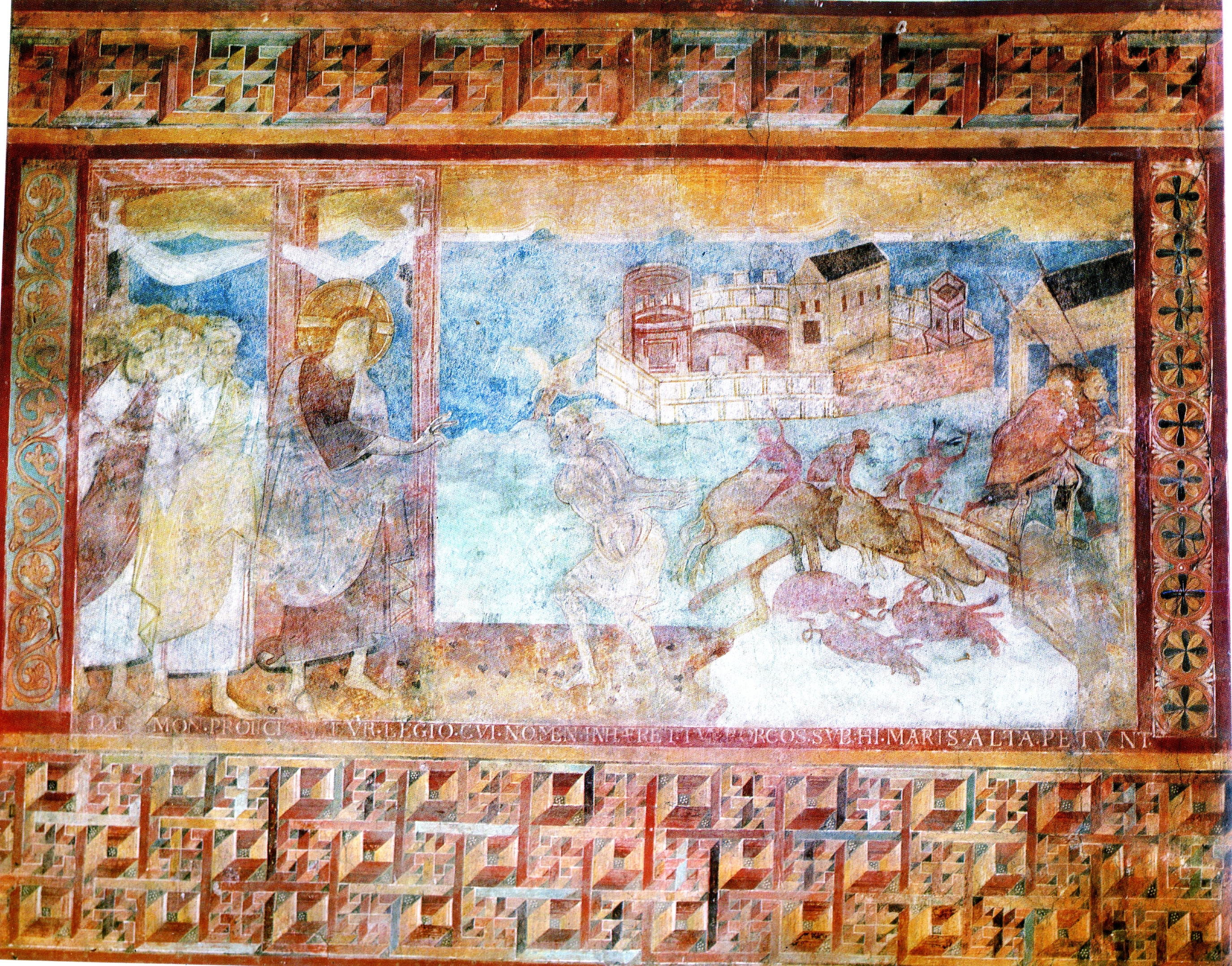 Reichenau-Oberzell, Fresko: Die Heilung des Besessenen von Gerasa